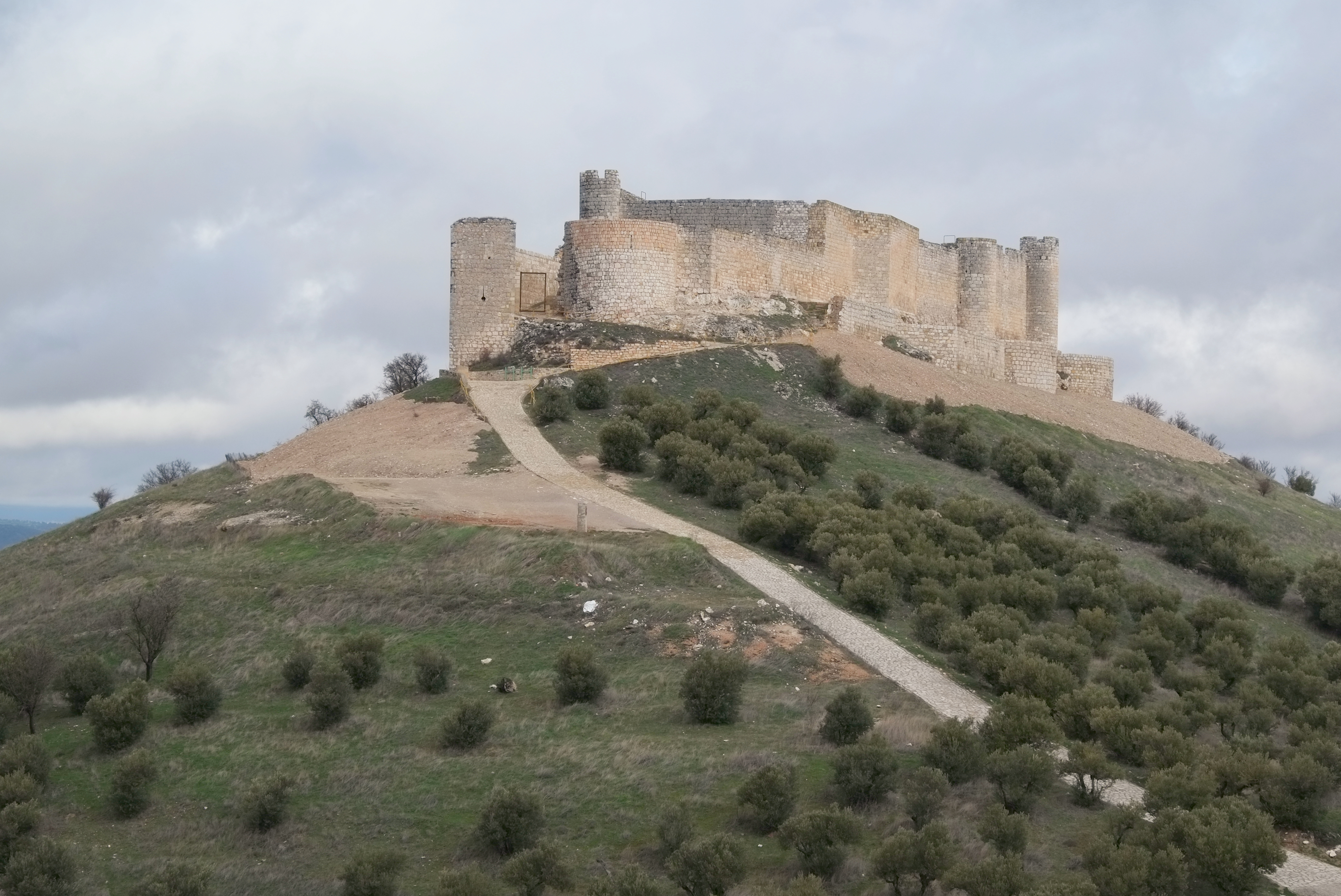 Castillo de Jadraque